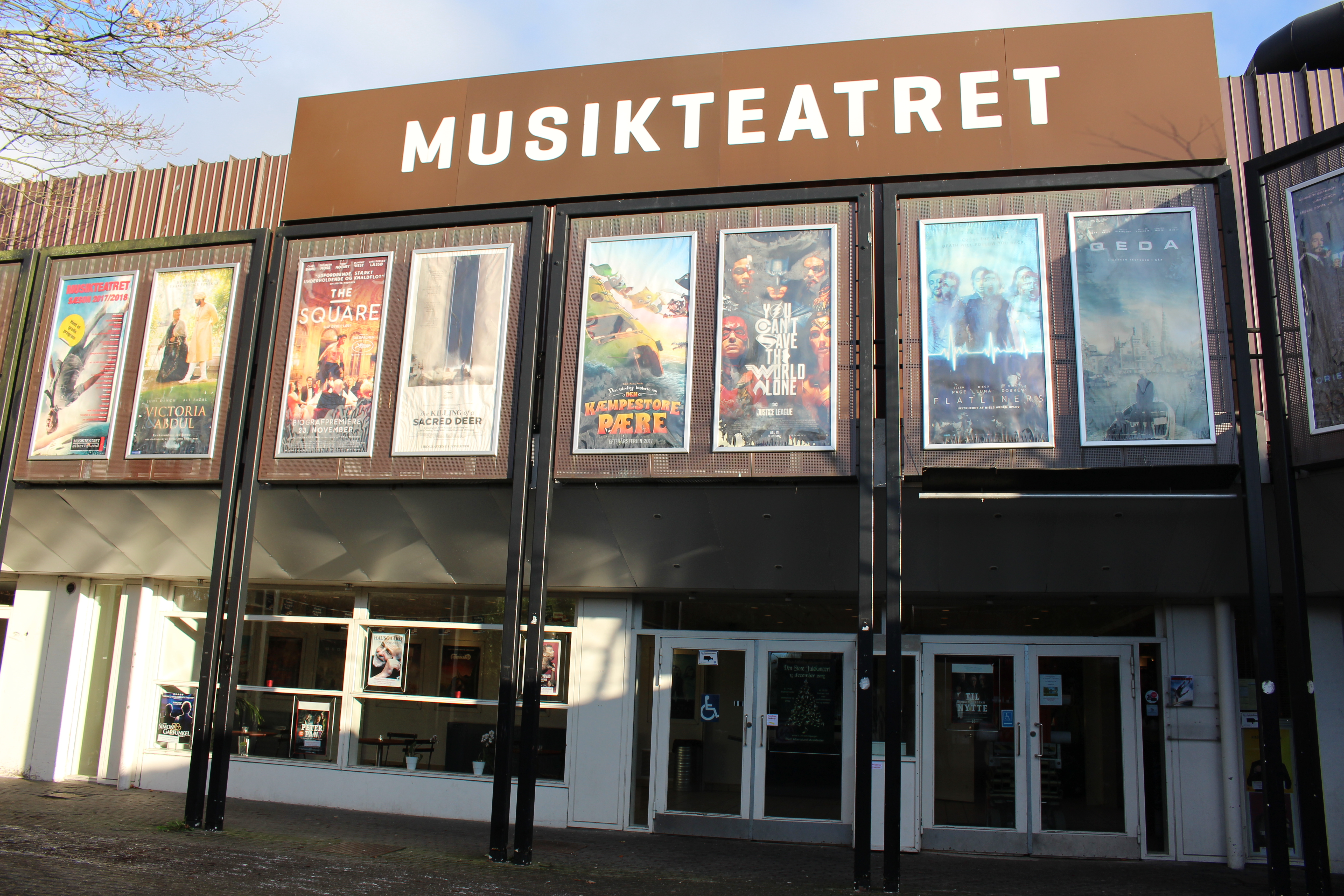 Musikteatret Albertslund